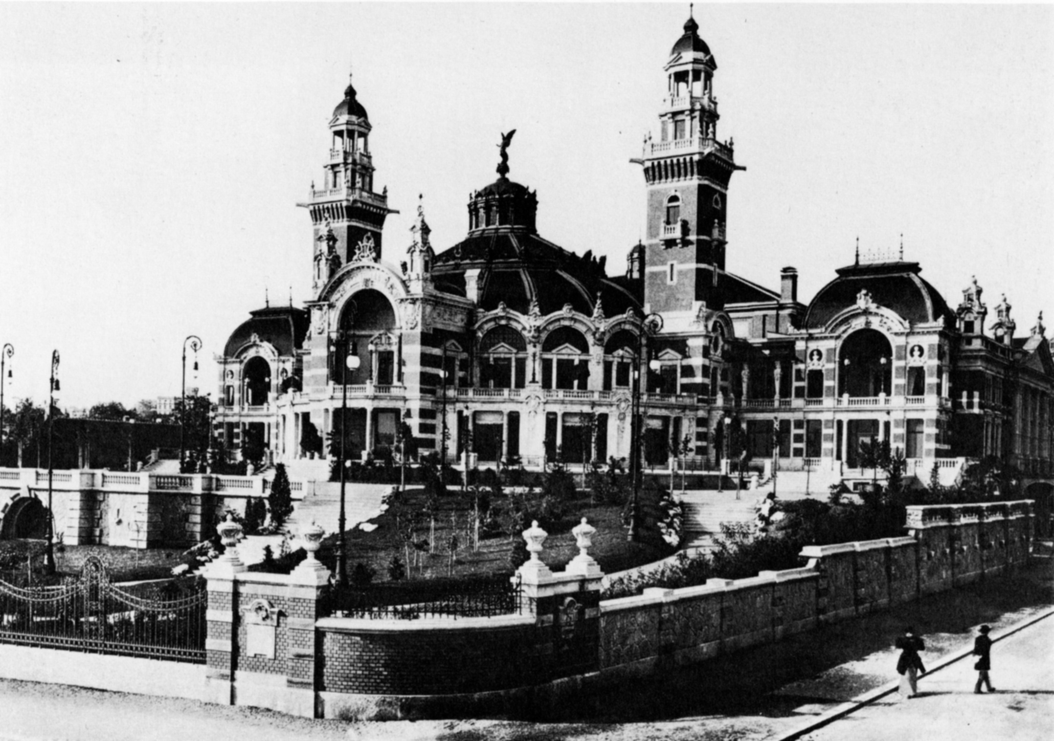 Die "Neue Tonhalle" in Zürich am General-Guisan-Quai (damals Alpenquai), 1900. Das Gebäude wurde nach Plänen der Architekten Fellner & Helmer aus Wien erstellt. 1937 teilweise abgerissen und durch das Kongresshaus Zürich ersetzt.